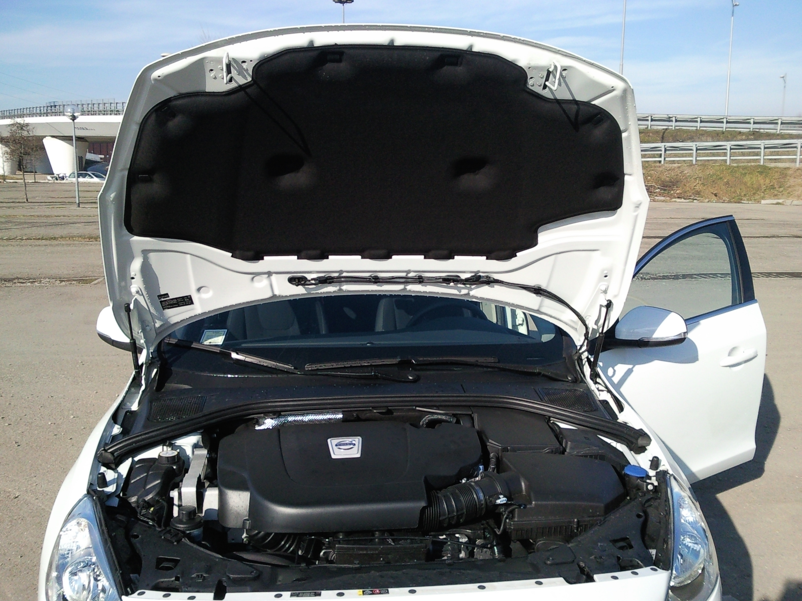 Vano motore della Volvo V60 D3.